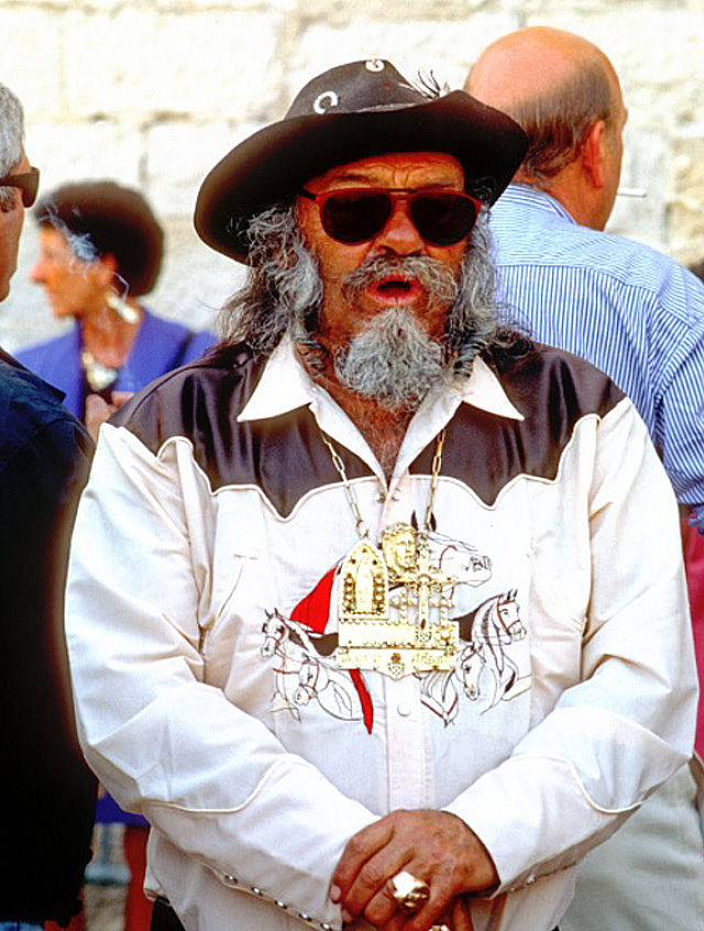 Le roi des gitans lors du pèlerinage aux Saintes-Maries-de-la-Mer